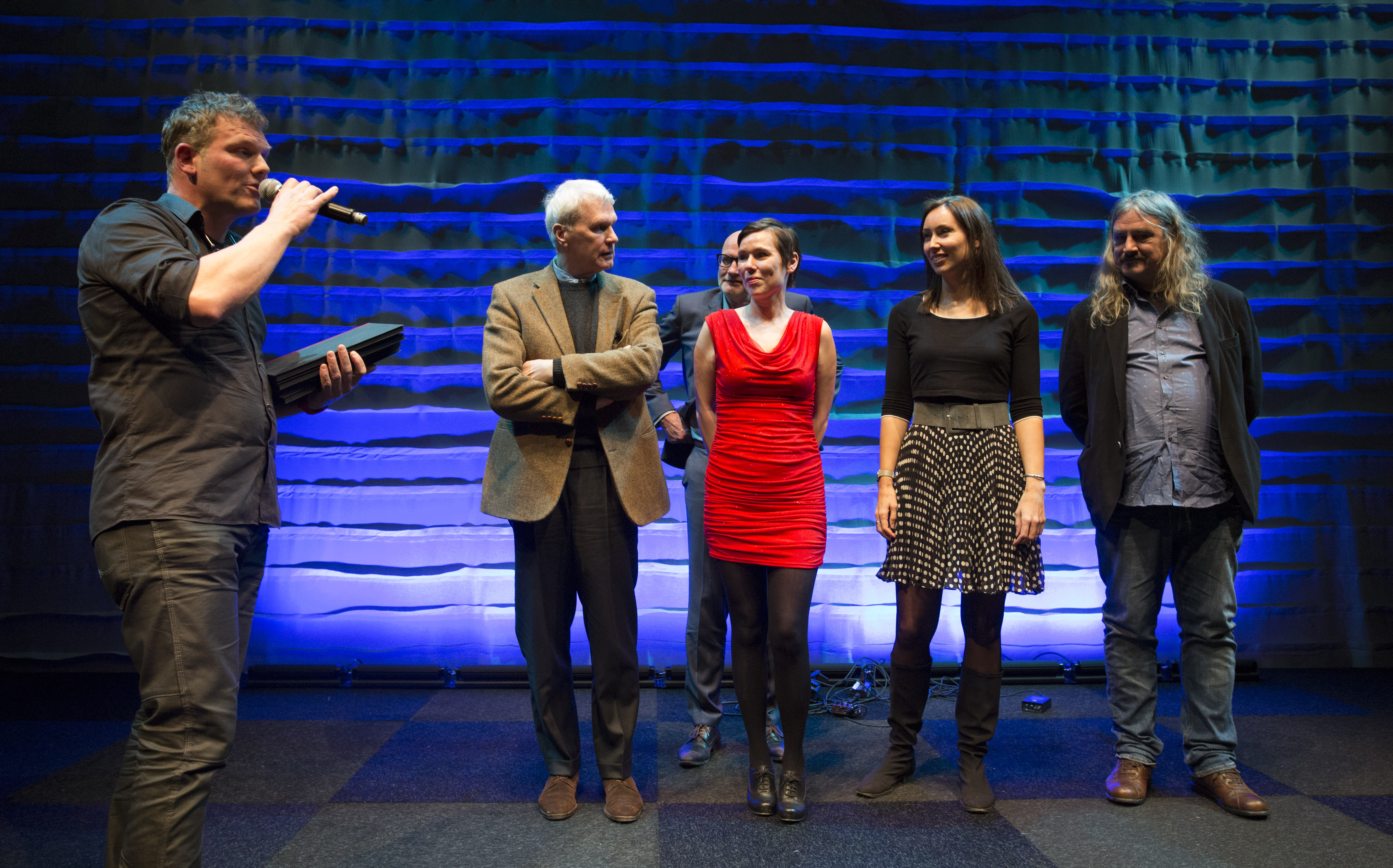 Jan Campertprijzen 2015: V.l.n.r.: Joris Wijsmuller, Adriaan van Dis, Annelies Verbeke, Anna Woltz & Ilja Pfeijffer. Schrijversfeest - Winternachten 2016 Schrijversfeest Theater aan het Spui, Den Haag, Nederland